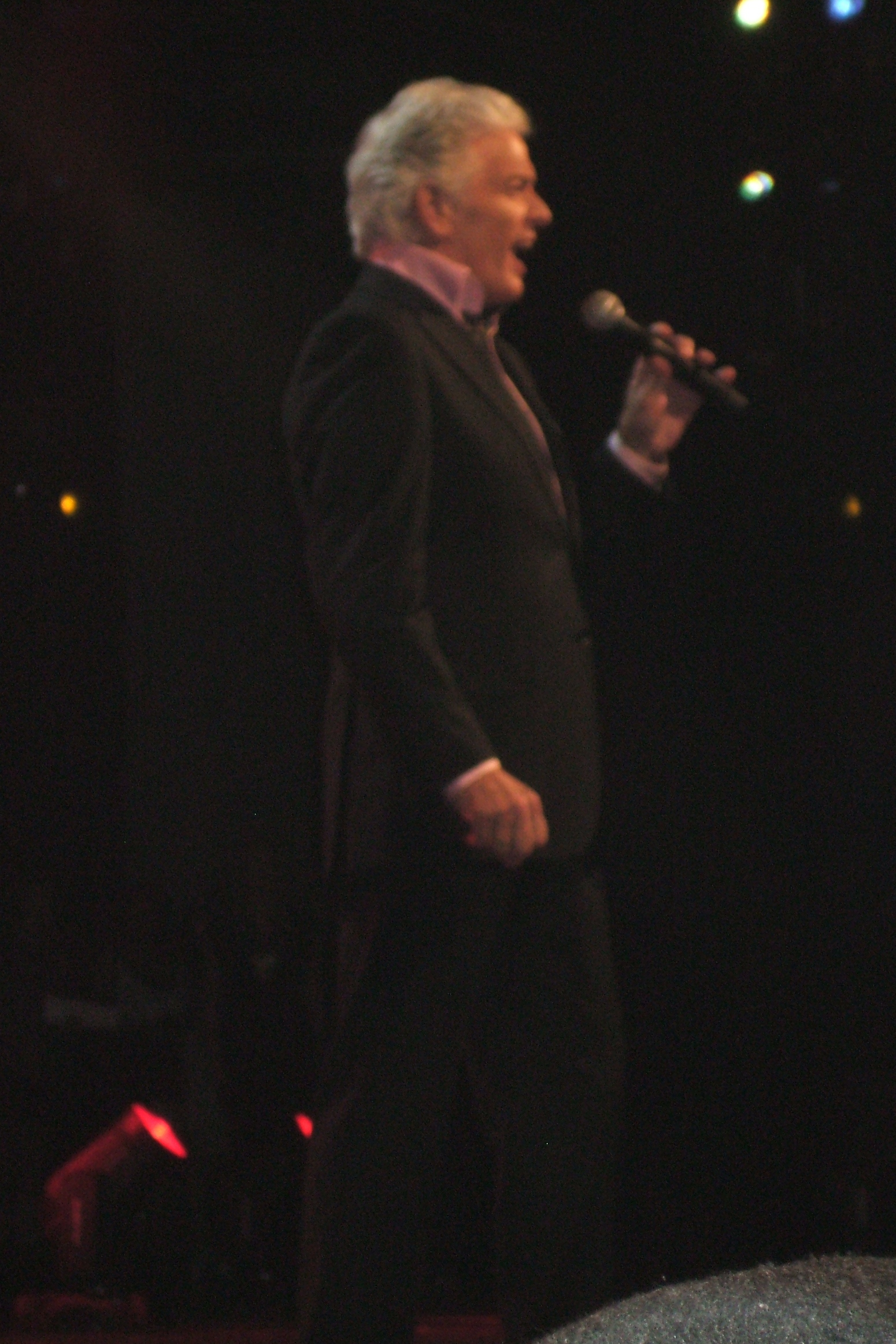 Pauzenummer tijdens het Nationaal Songfestival 2011 Ben Cramer